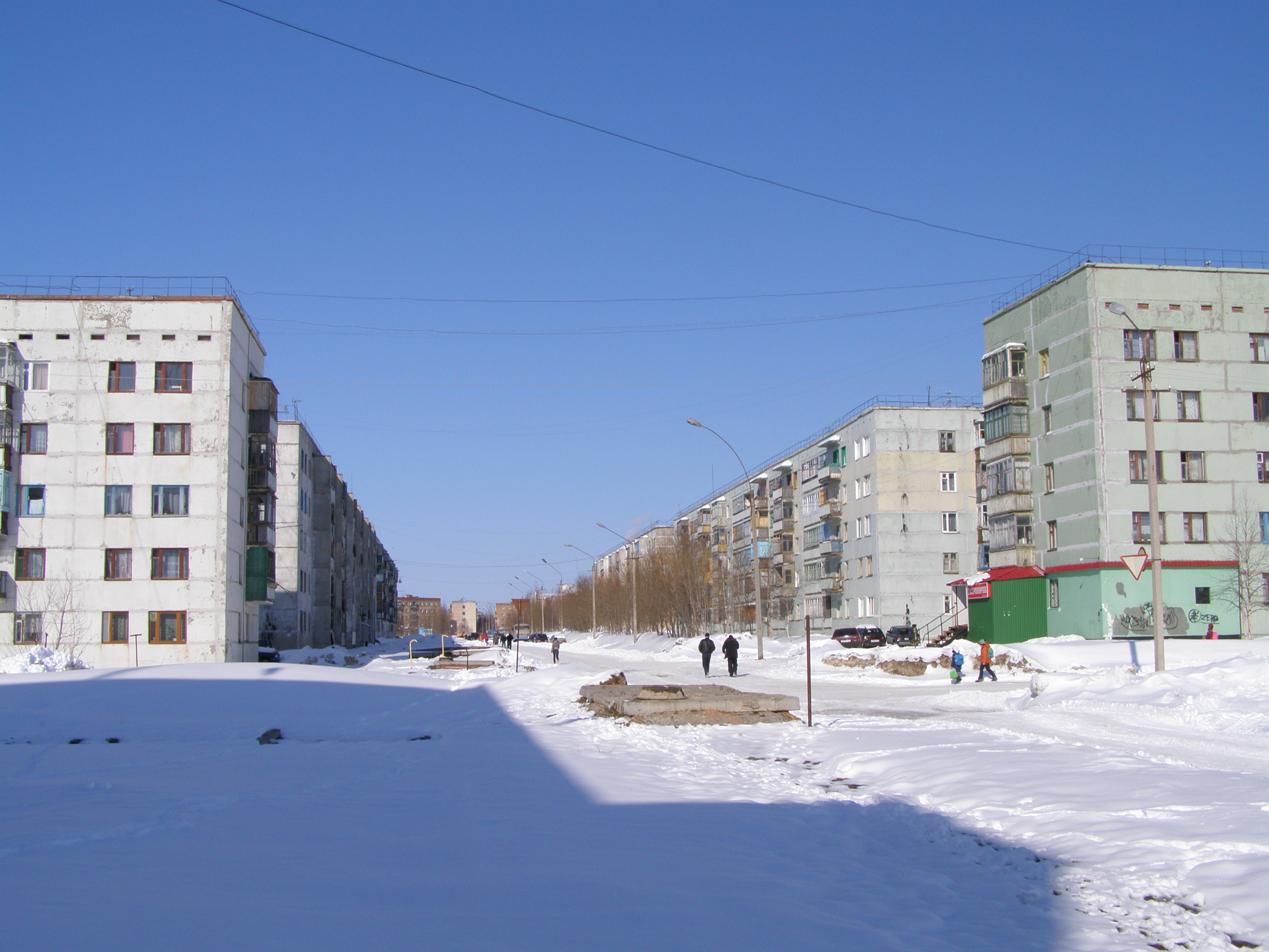 Вуктыл. Коммунистическая улица.